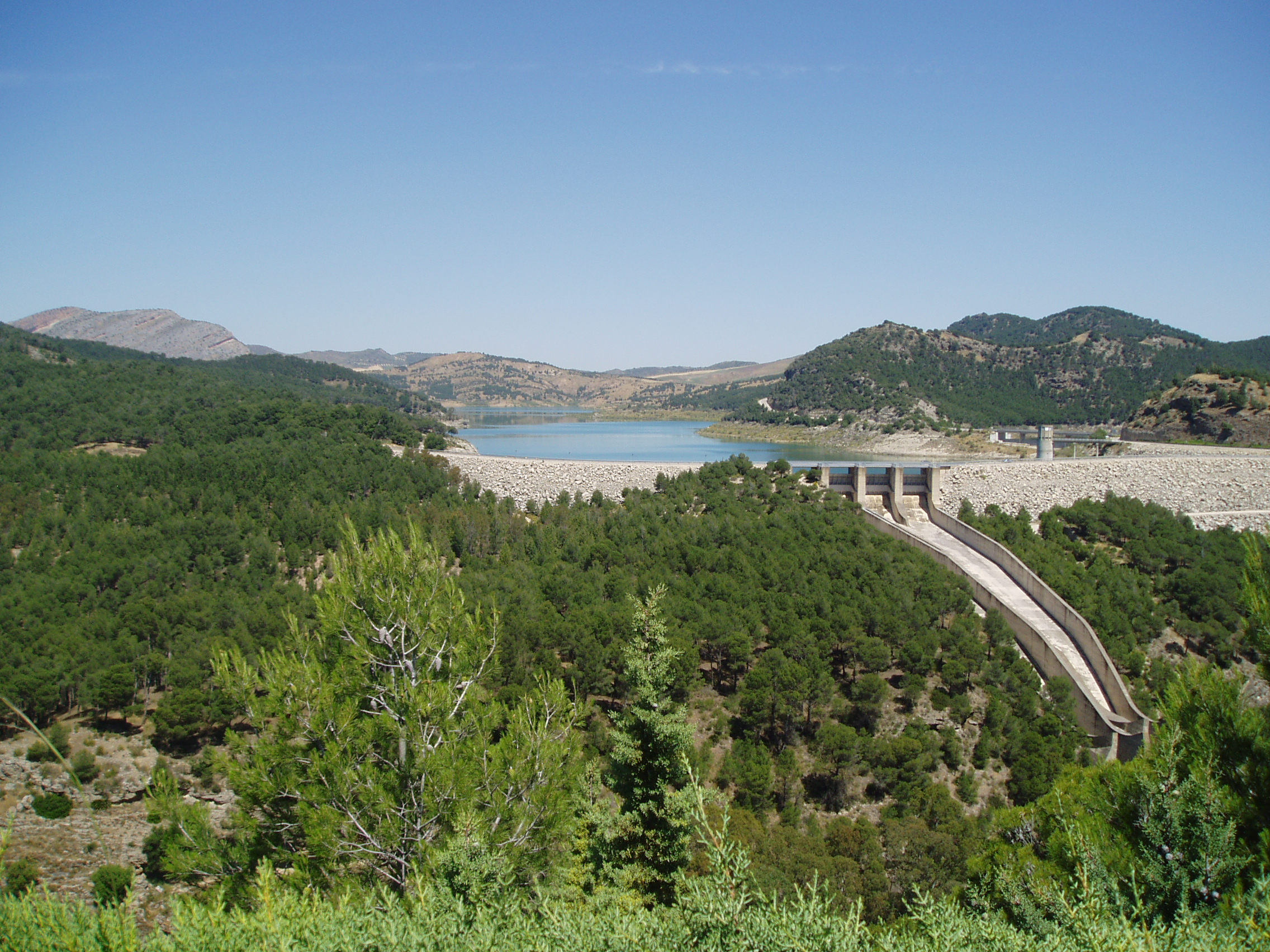 Aliviadero de la presa Guadalhorce Guadalteba